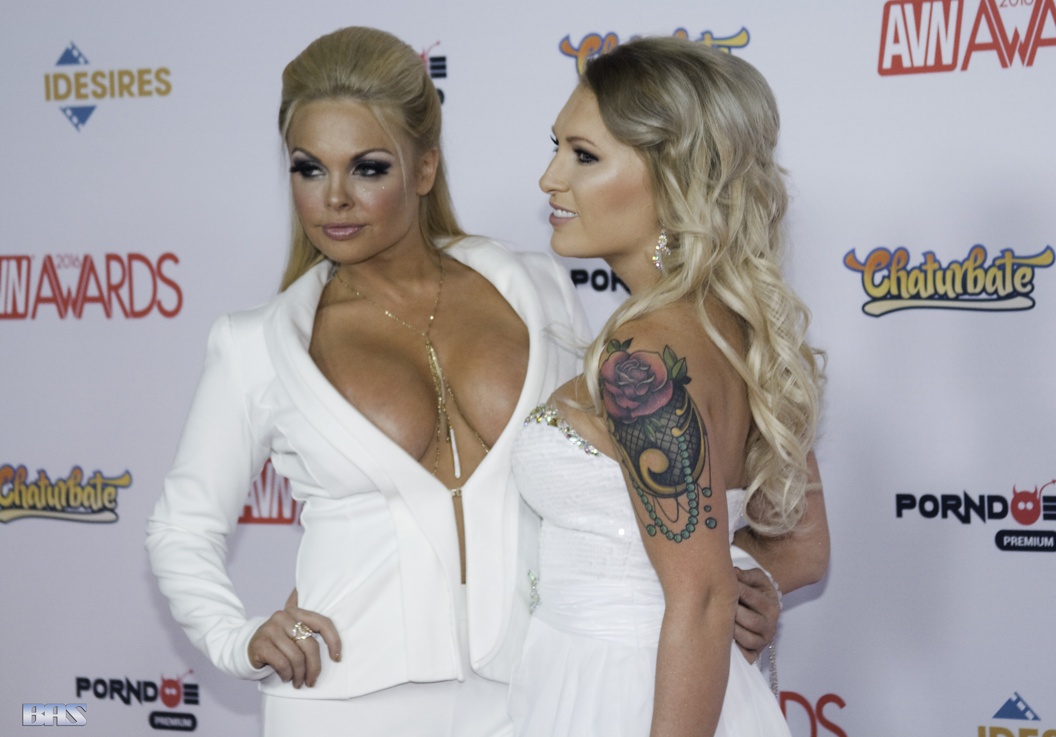 AVN16_0948bas